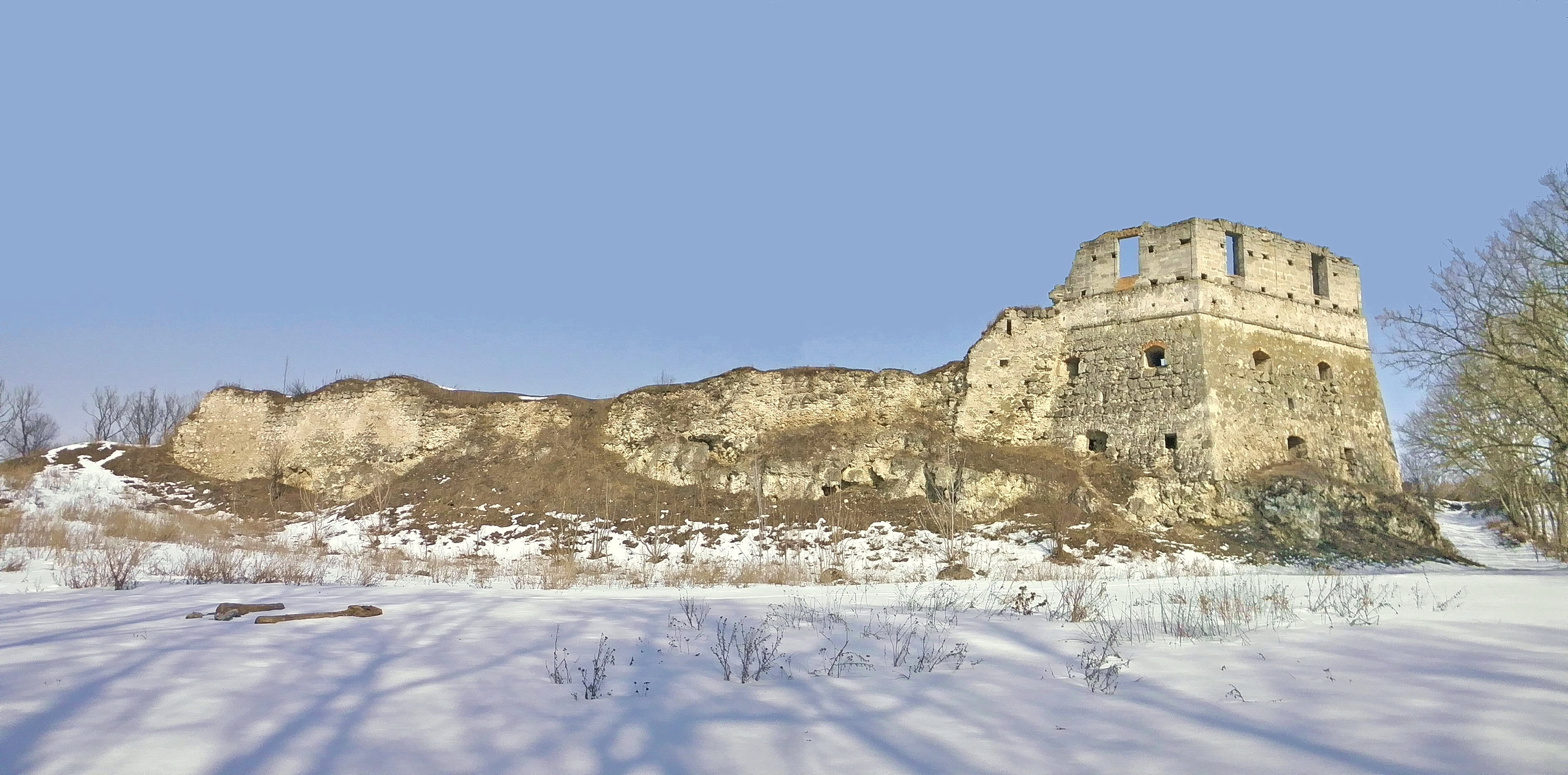 Замок(мур.), Токи